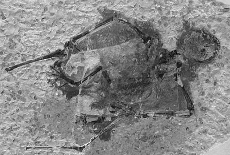 Jeholopterus fossil